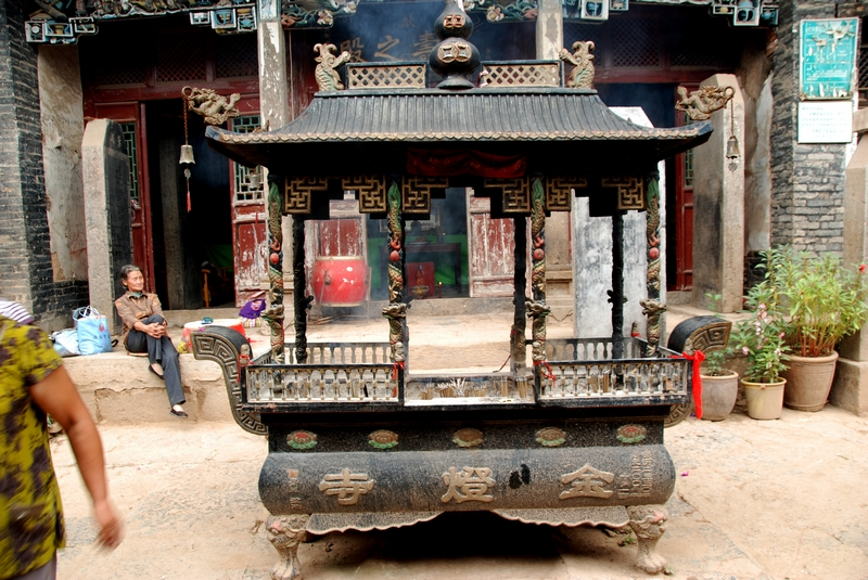 金灯寺